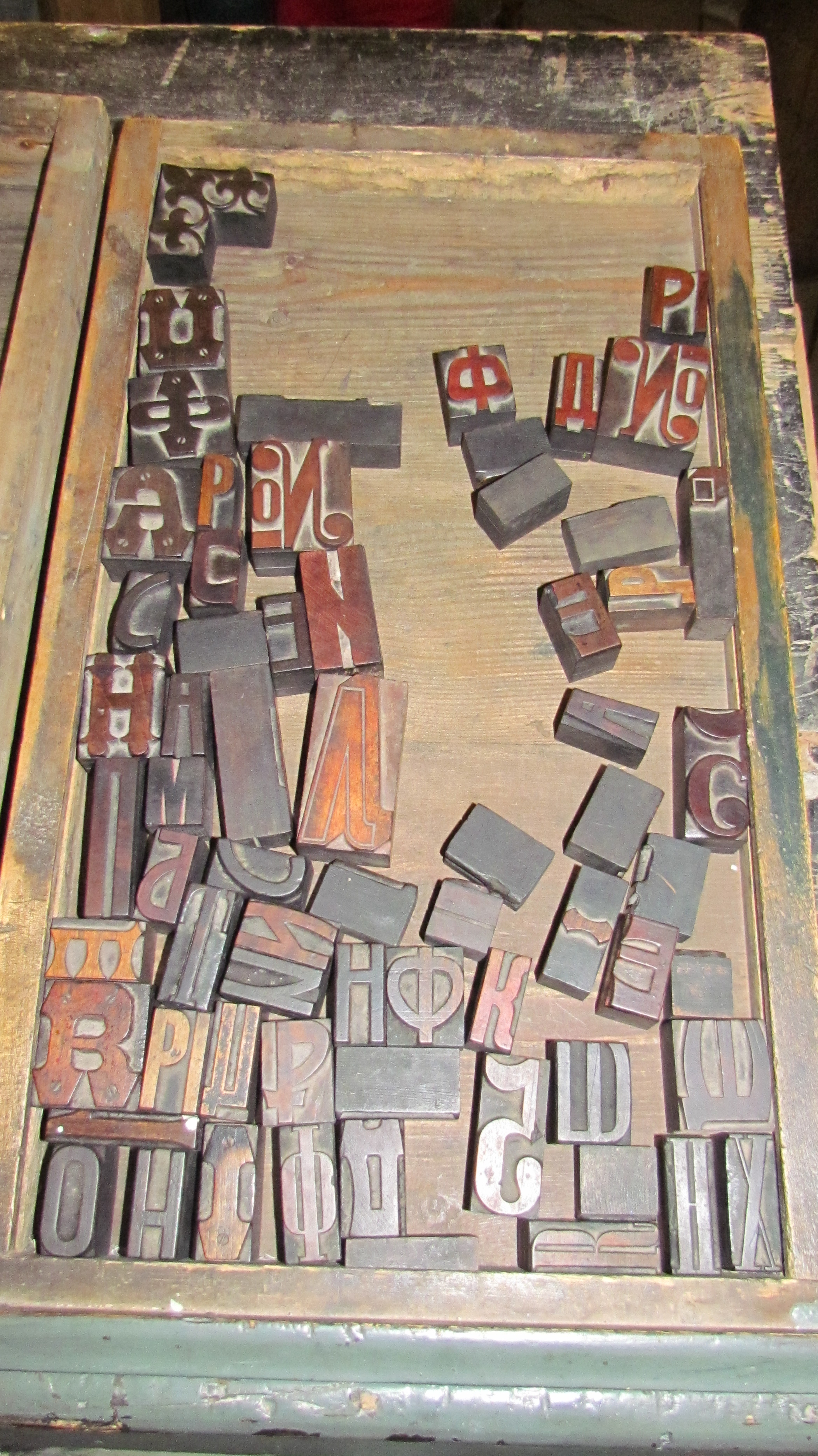 Шрифти. Папірня в Радомишлі